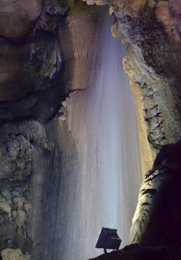 mağaranın içindeki şelale